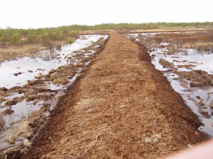 Profilierter Damm zum Wasserstau im Naturschutzgebiet „Hahnenknooper Moore“ im Landkreis Cuxhaven, Niedersachsen. Durch Kammerung und Grabenverdämmung kommt der Erfolg (Wiedervernässung).